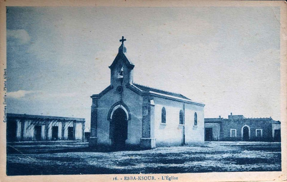 Église d'Ebba-Ksour, aujourd'hui Dahmani, en Tunisie dans les années 1920